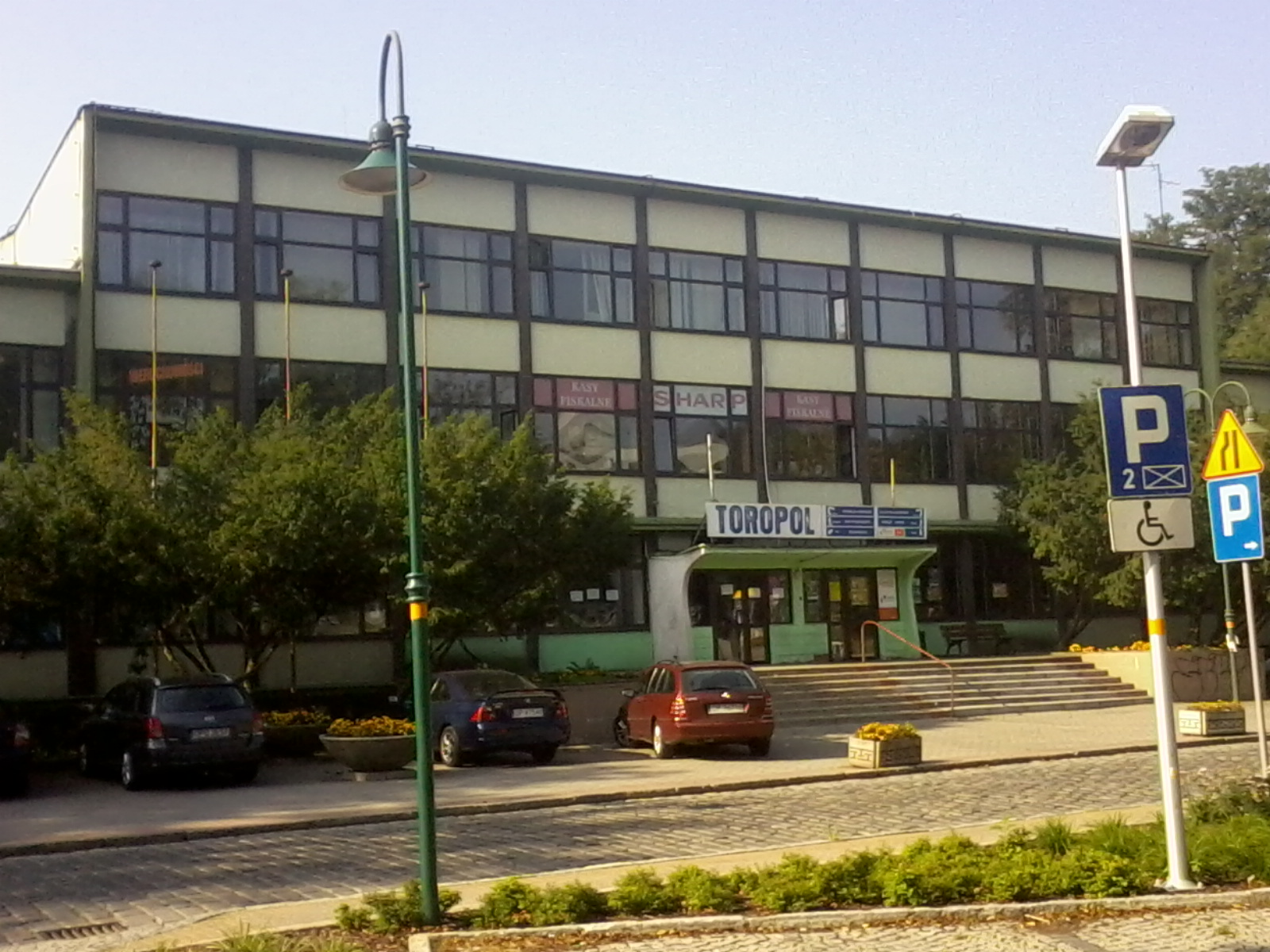 Największe lodowisko w Opolu